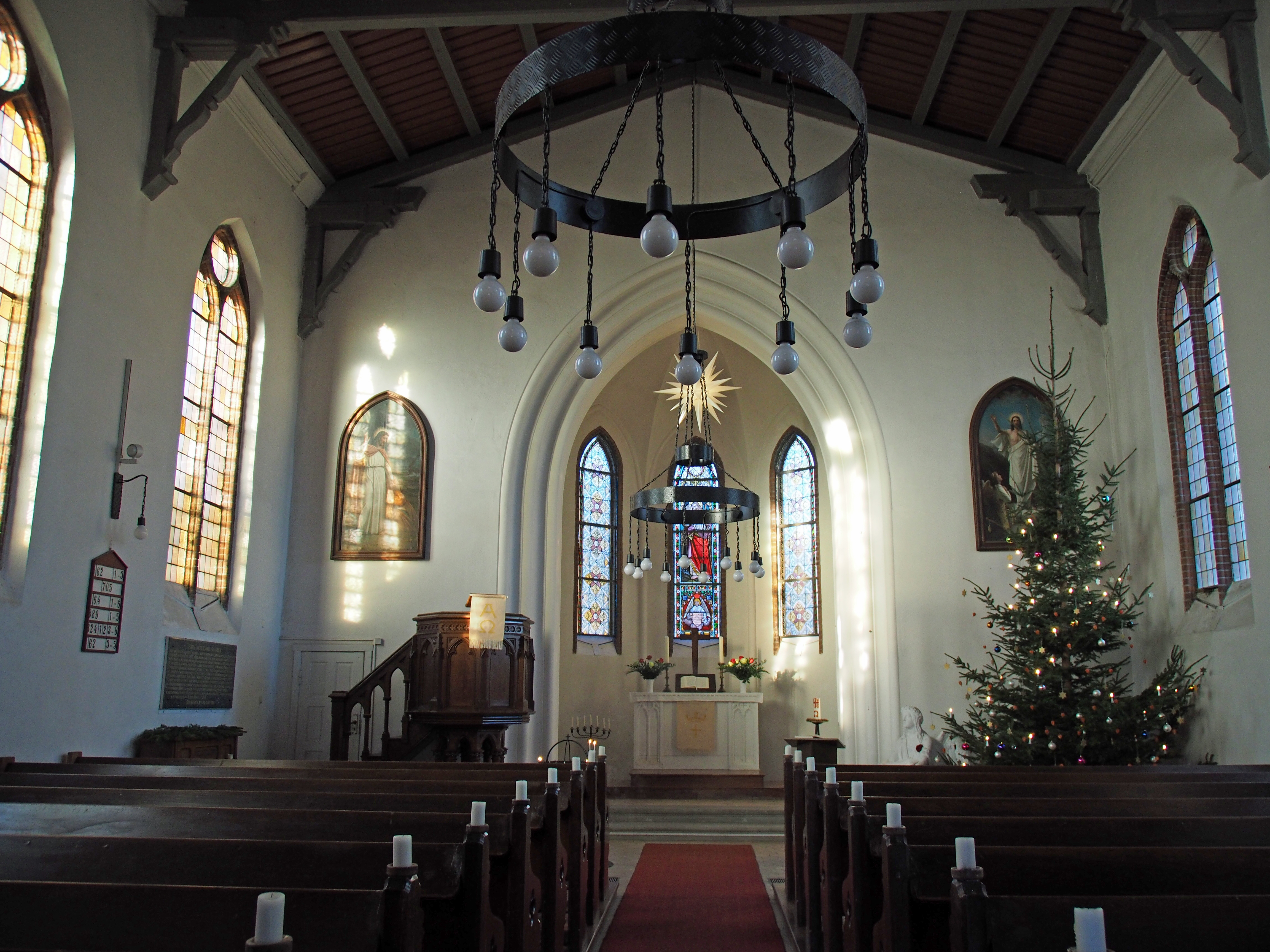 Kirchenschiff der St.-Johannis-Kirche Sassnitz (Rügen)